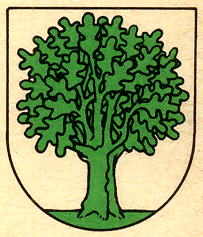 Wappen von Engollon Kanton Neuenburg Schweiz